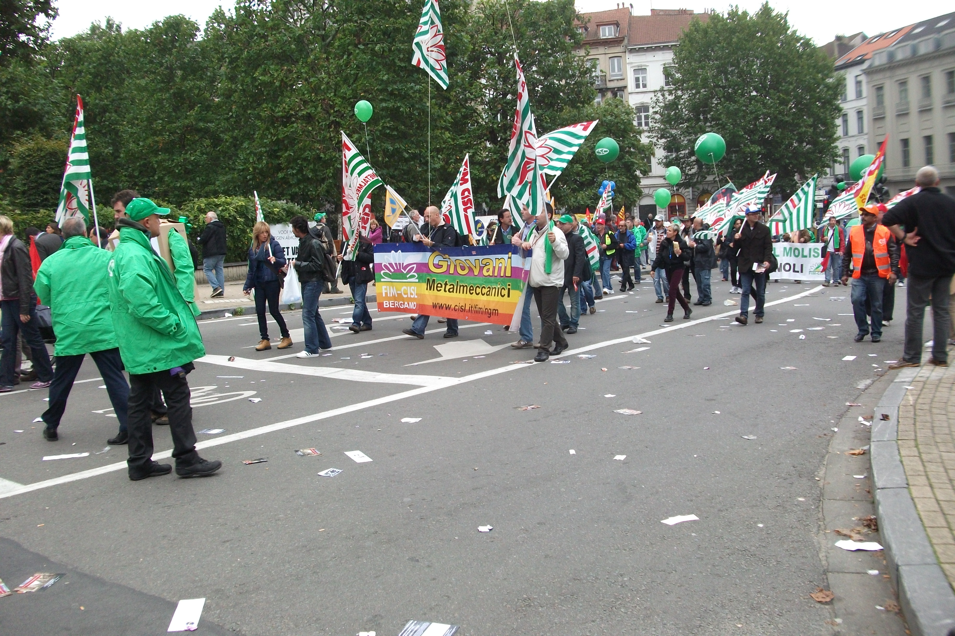 Manifestation à Bruxelles conter la politique européenne d'austérité en 2010, le CISL de Bergame.